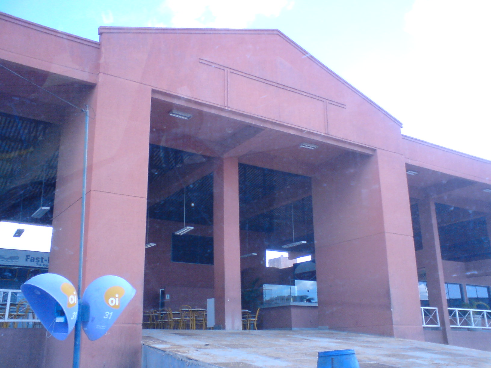 Entrada da parada de viajantes em Lajes, com banheiros, restaurantes e lanchonetes